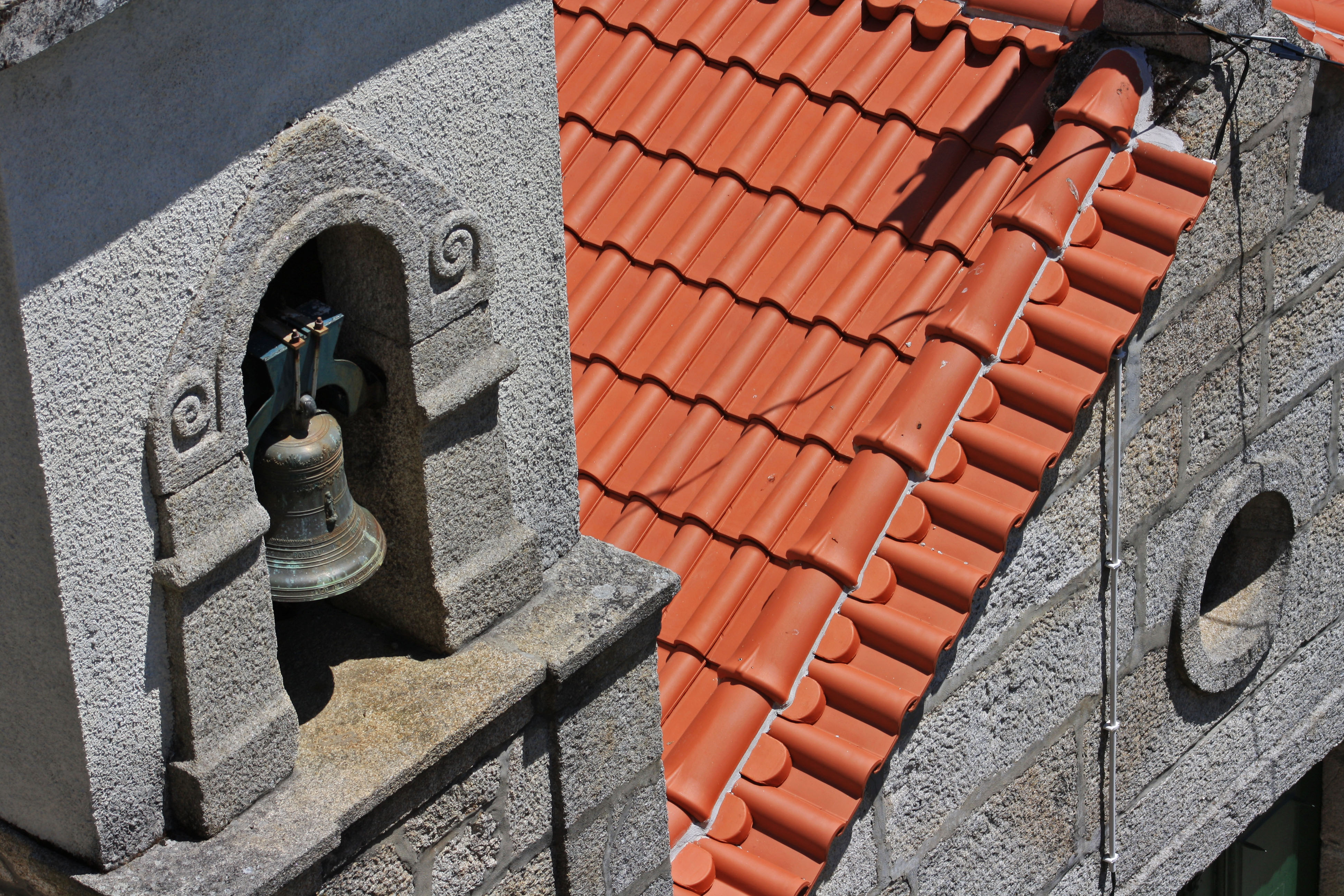 74519-Igreja Românica de São Pedro das Águias - Viseu / Tabuaço / Granjinha